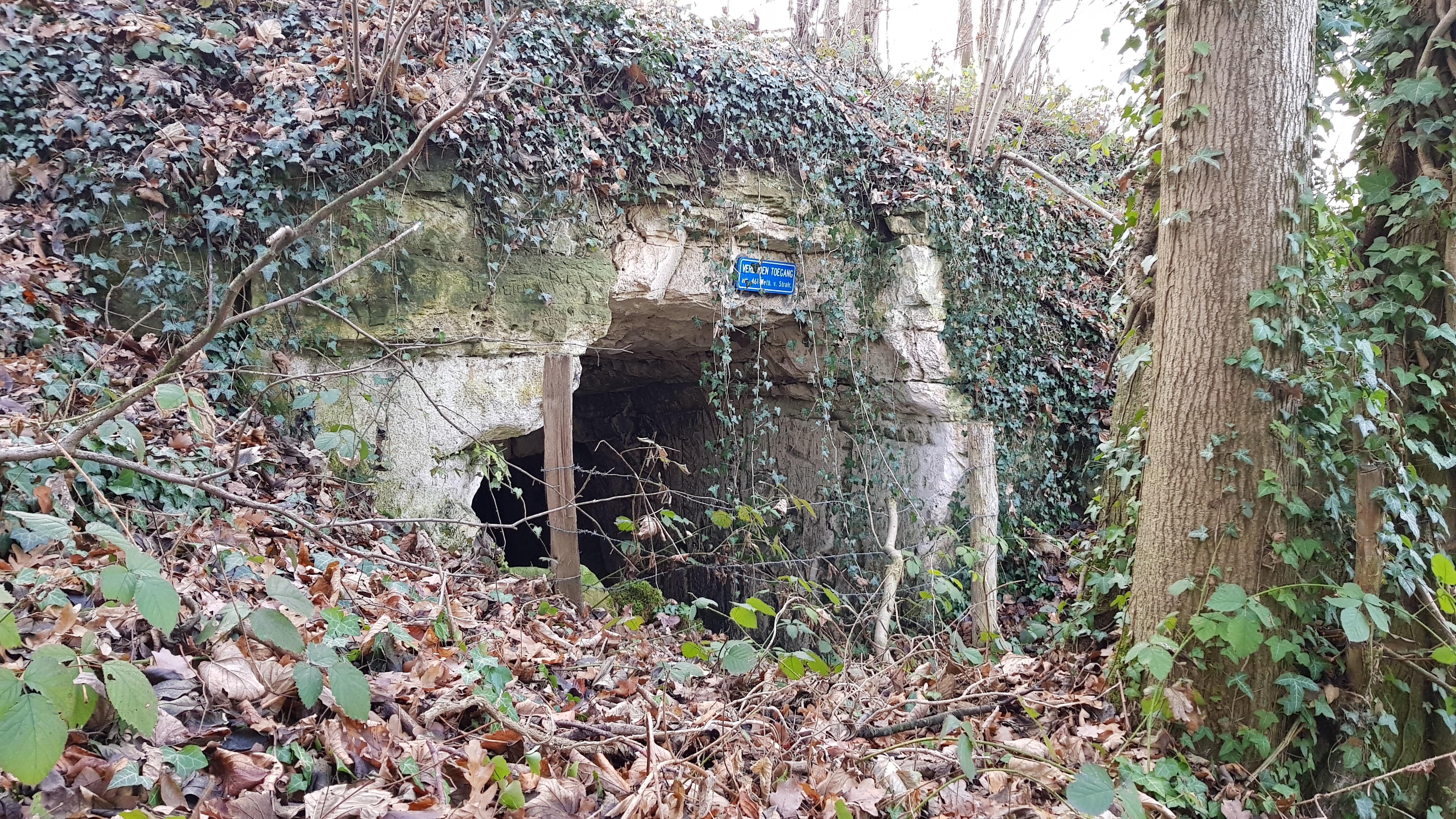 Sint-Jansboschgroeve III, Oud-Valkenburg, Nederland